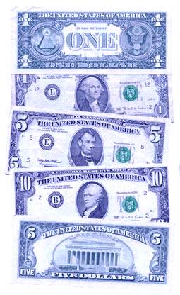 Dolar Blue eufemismo utilizado en Argentina